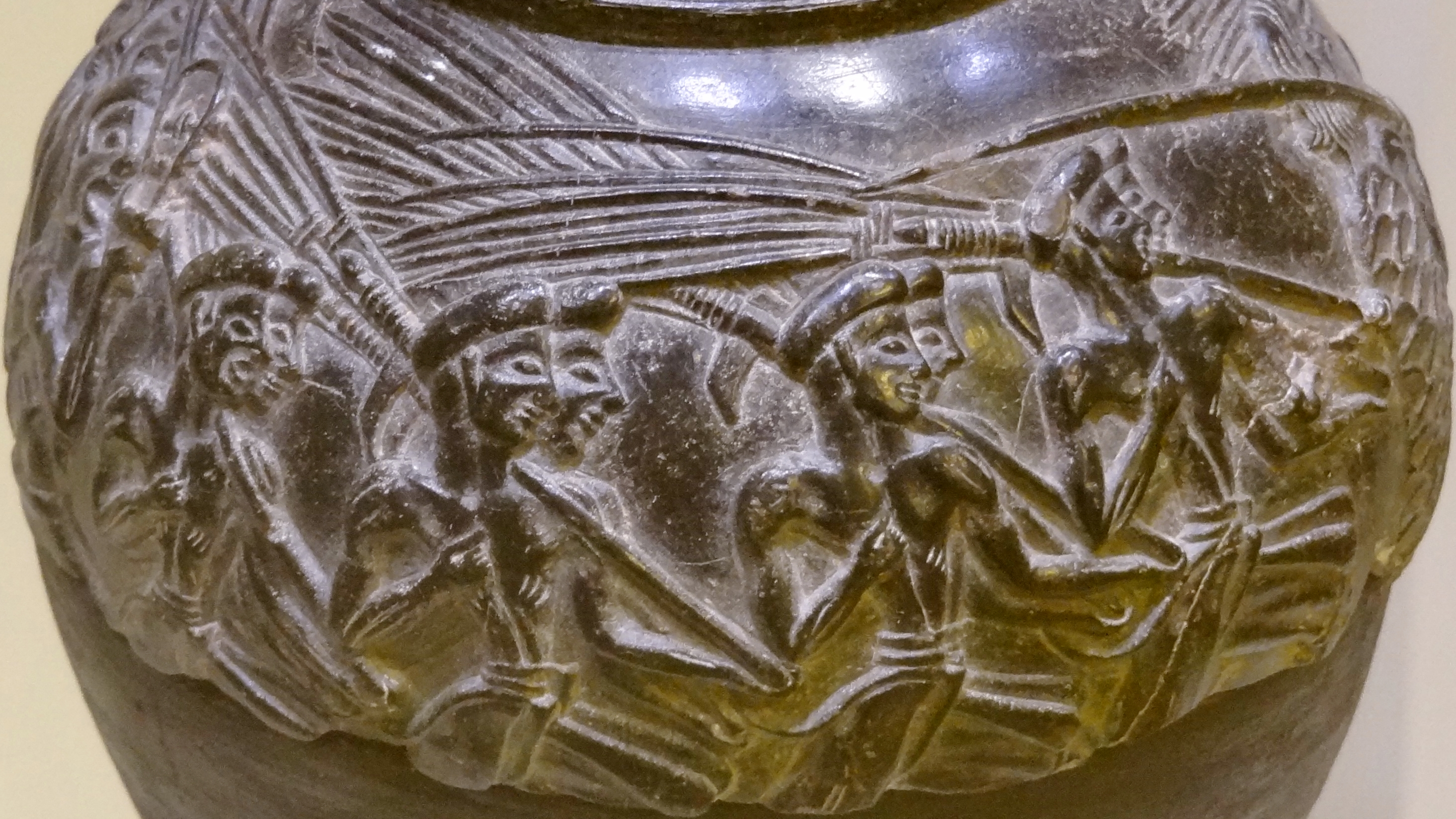 Detail des Reliefs der „Schnittervase“, Reliefrhyton aus Speckstein (Neupalastzeit 1500–1450 v. Chr.) aus Agia Triada, ausgestellt im Archäologischen Museum Iraklio, Kreta, Griechenland